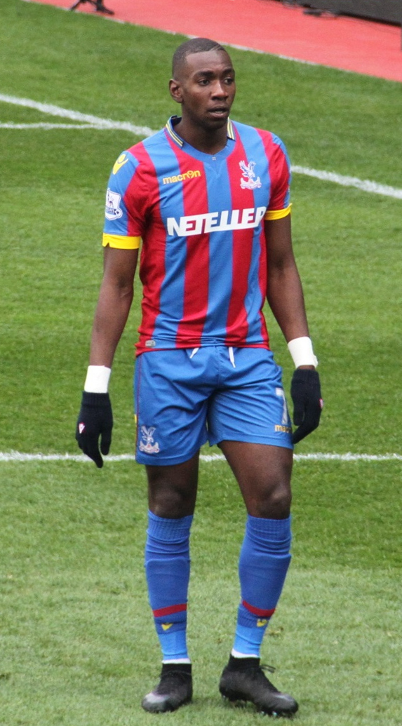 Yannick Bolasie, joueur de football professionnel